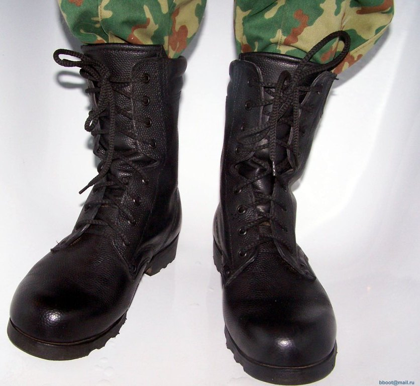 Ботинки армейские из юфти